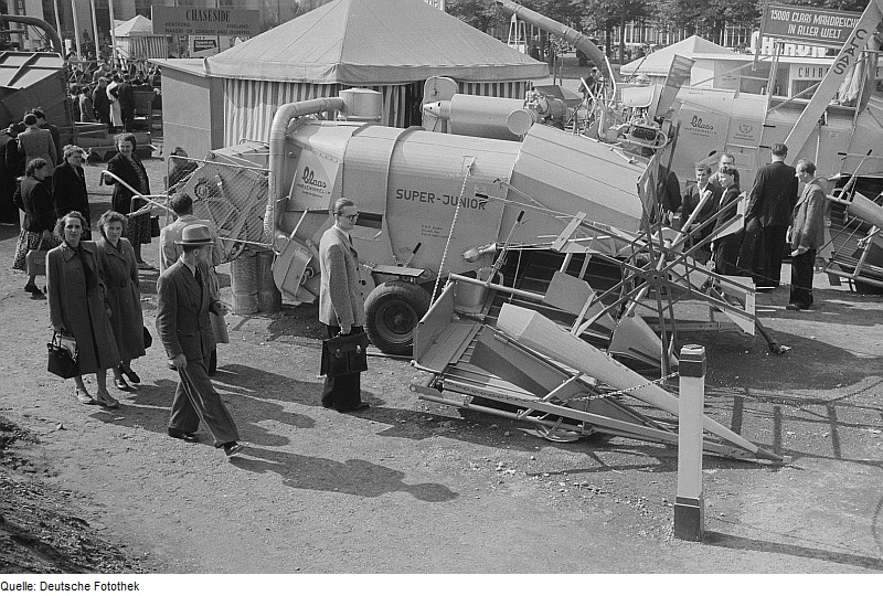 Original image description from the Deutsche Fotothek Mähdrescher vom Typ Super-Junior der Firma Claas, Harsewinkel auf der Leipziger Herbstmesse 1954